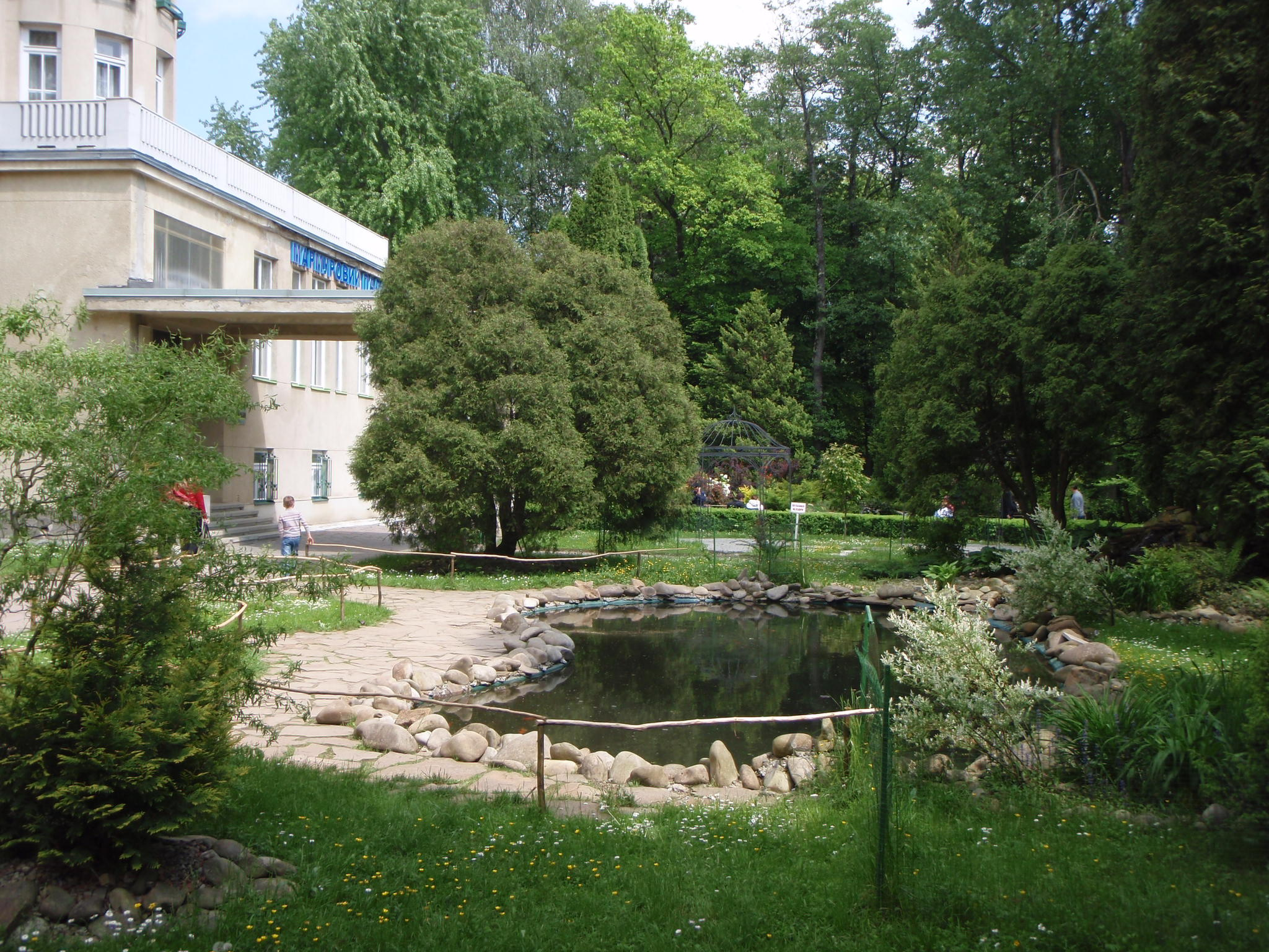 Парк біля санаторію "Мармуровий палац", місто Моршин, Львівська область, Україна